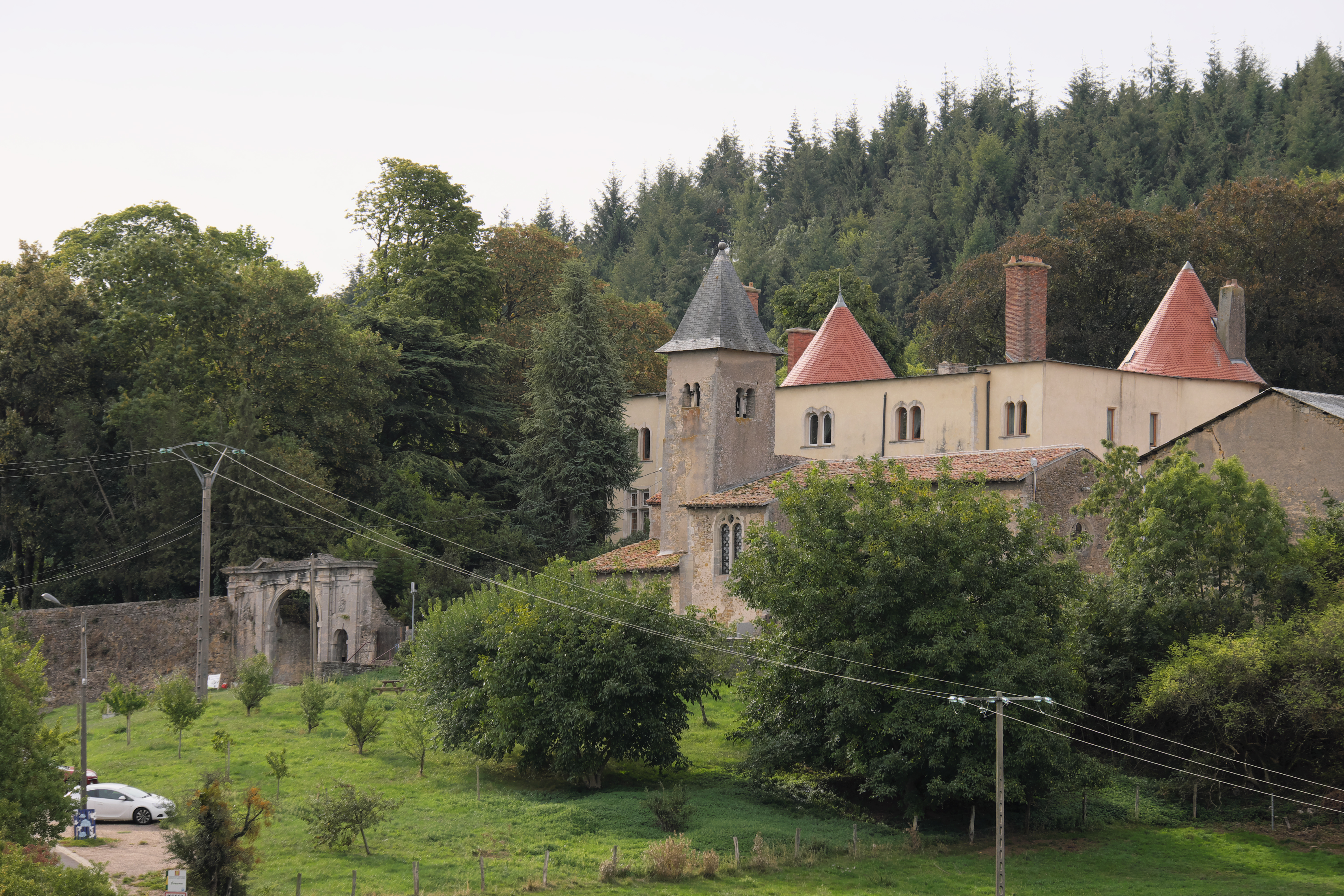 Vue générale du château et de l'église Saint-Pierre-et-Saint-Paul de Morey à Belleau en Meurthe-et-Moselle, vus depuis la route départementale n° 44A. .